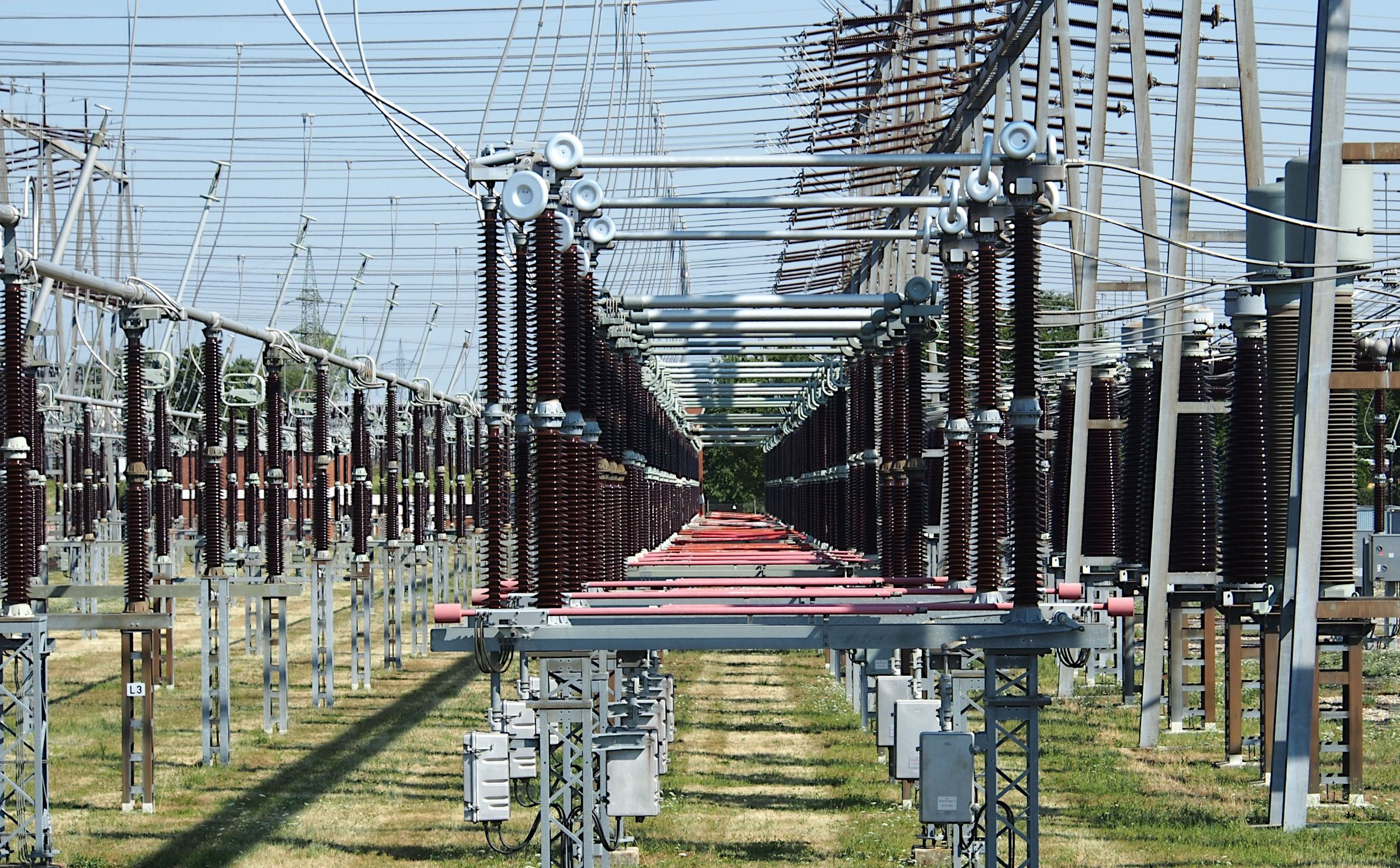 Eine lange Reihe Trennschalter im 380kV-Teil des Umspannwerks Pulverdingen. Links eine Reihe offene Schalter, rechts Messwandler.